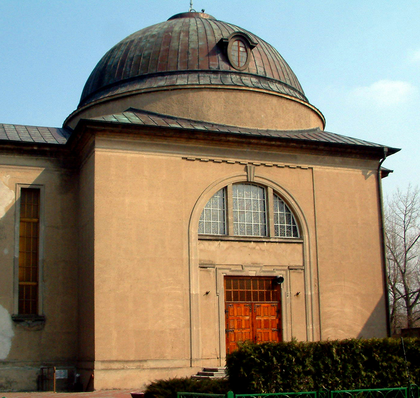 Kościół św. Teresy od Dzieciątka Jezus w Kruszwicy1